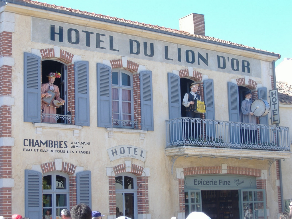 animation de rue : les automates du Bourg 1900